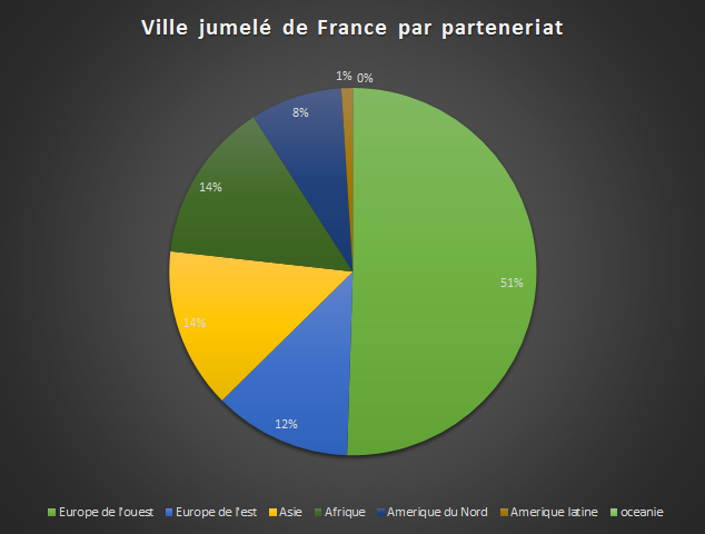 Il s'agit d'une recension faite à partir des villes dépositaire des partenariats de jumelage en France. Elle permet d'illustrer les relations internationales qu'entretiennent les municipalités françaises avec le reste du monde.